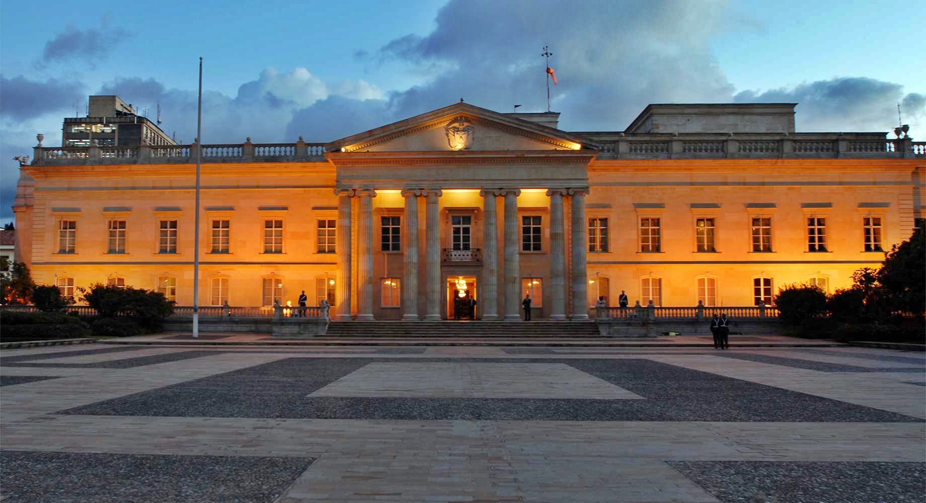 fachada del palacio de nariño